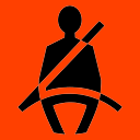 Témoin de ceinture de sécurité non bouclée